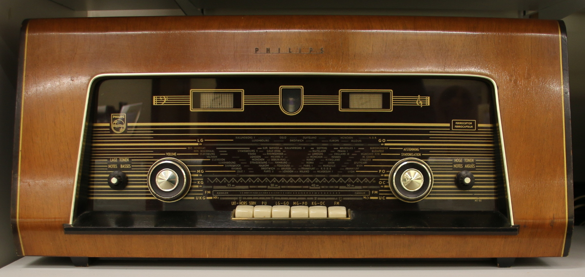 Philips B 5 X 62 A, bouwjaar 1957